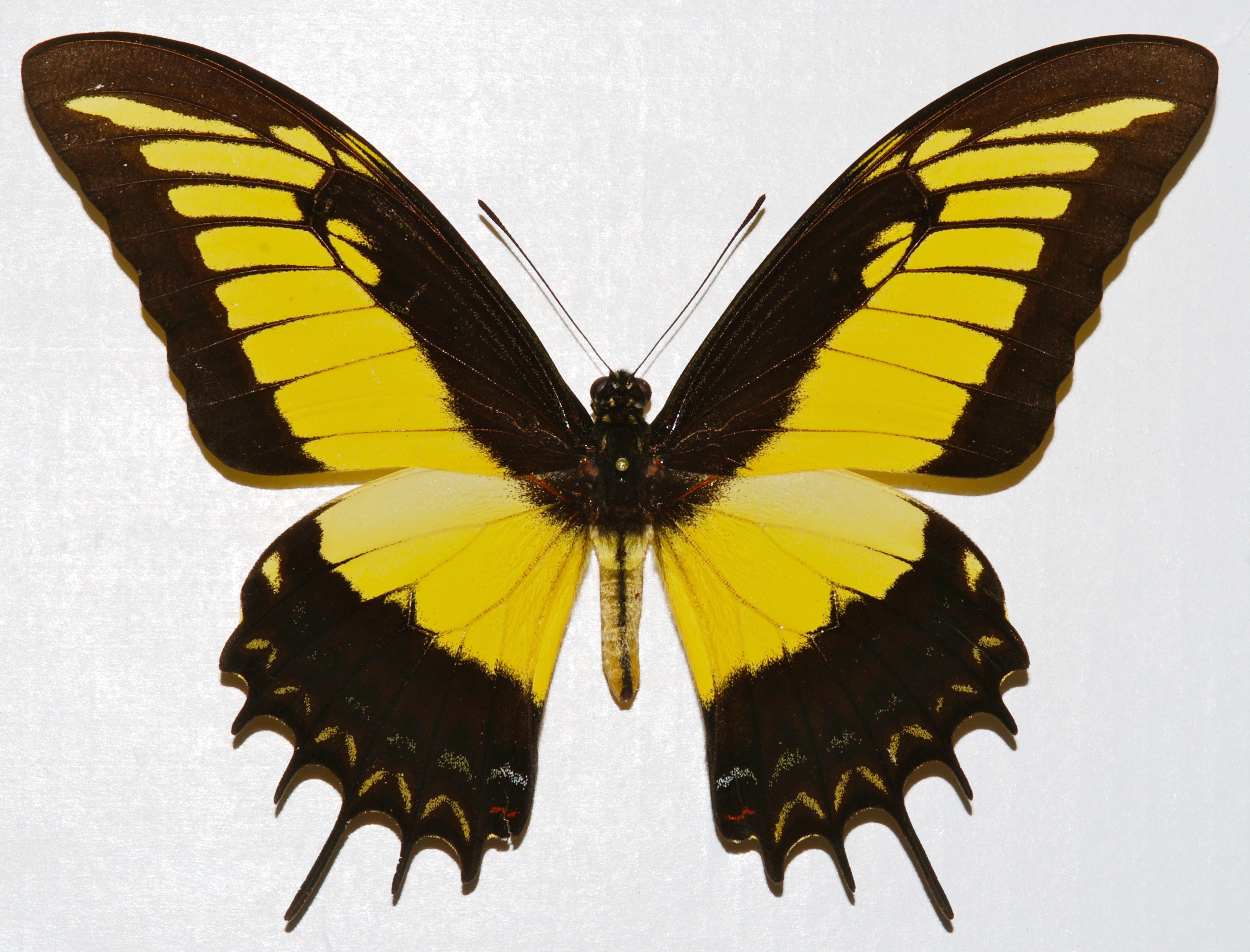 Tingo Maria, PERU